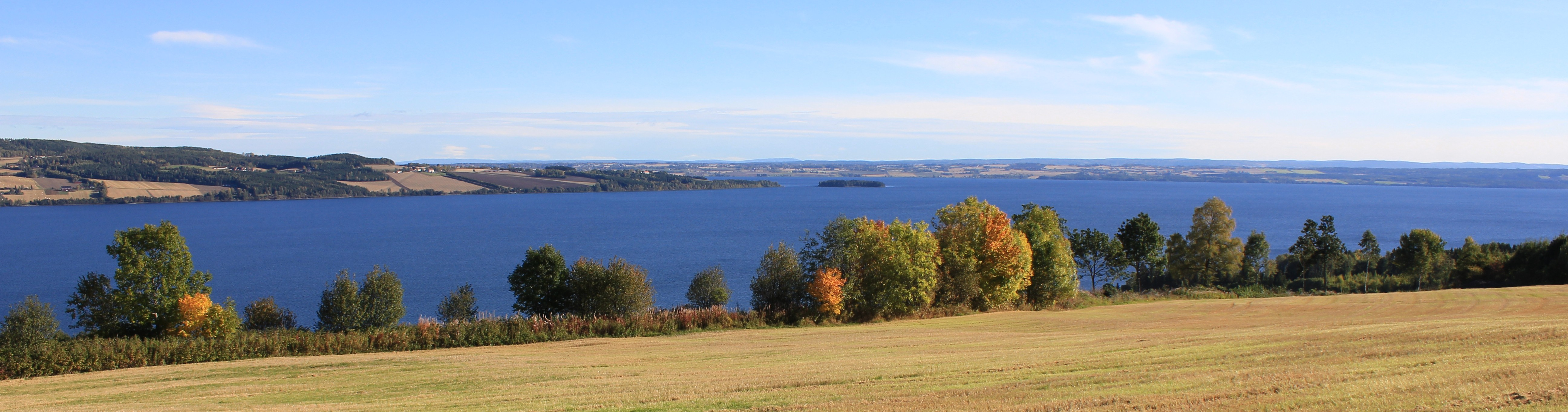 Mjøsa sett fra Starum.